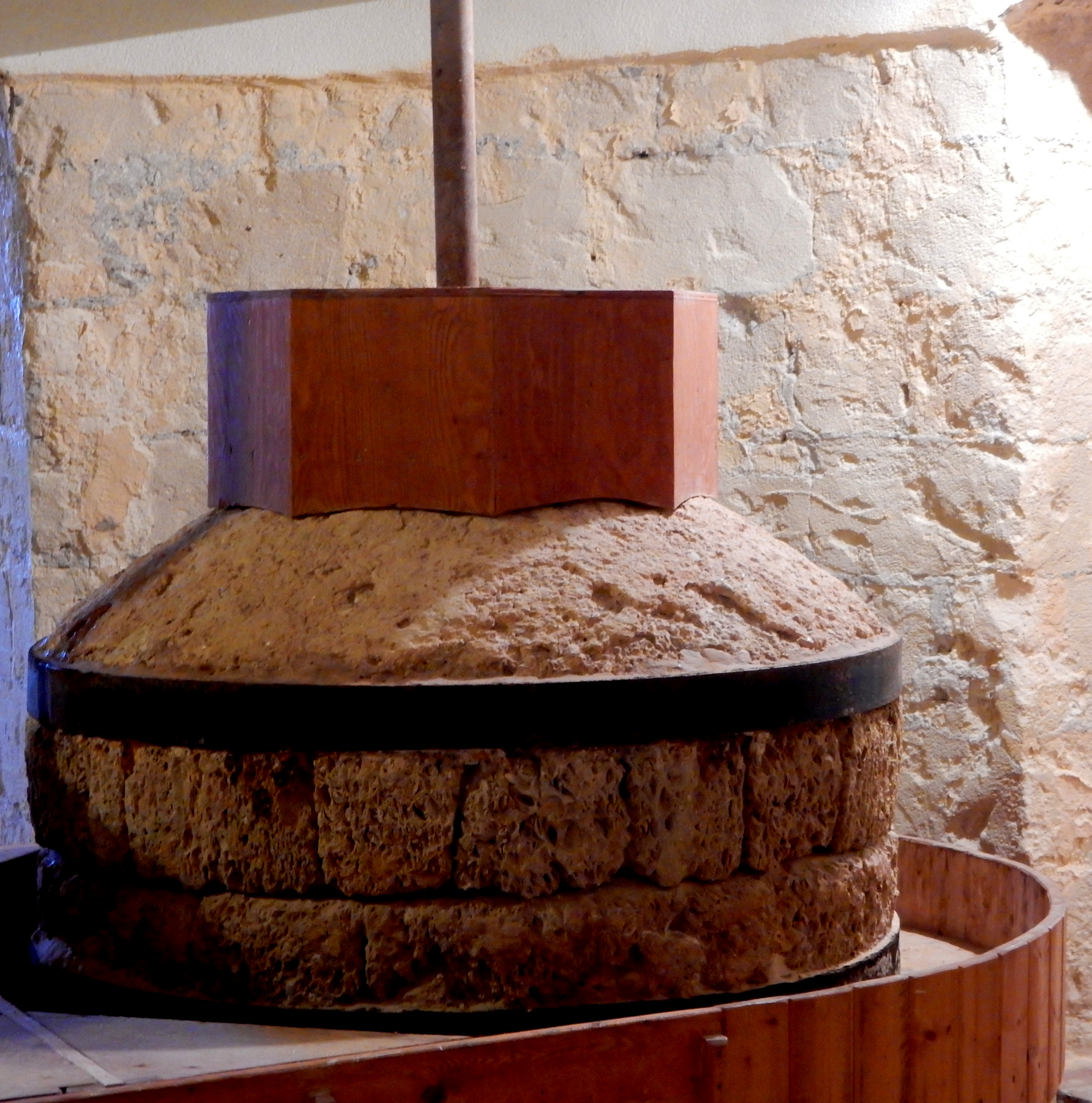 Saline di Trapani e Paceco - Riserva Naturale Regionale This is a photo of a monument which is part of cultural heritage of Italy. The authorisation for taking photos of this object was provided by the World Wide Fund for Nature Italy.